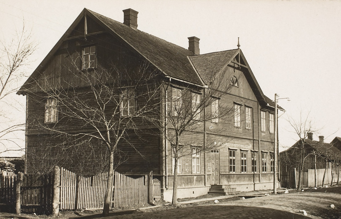 Mõisaküla kõrgem algkool This image on geotagging crowdsourcing platform Ajapaik